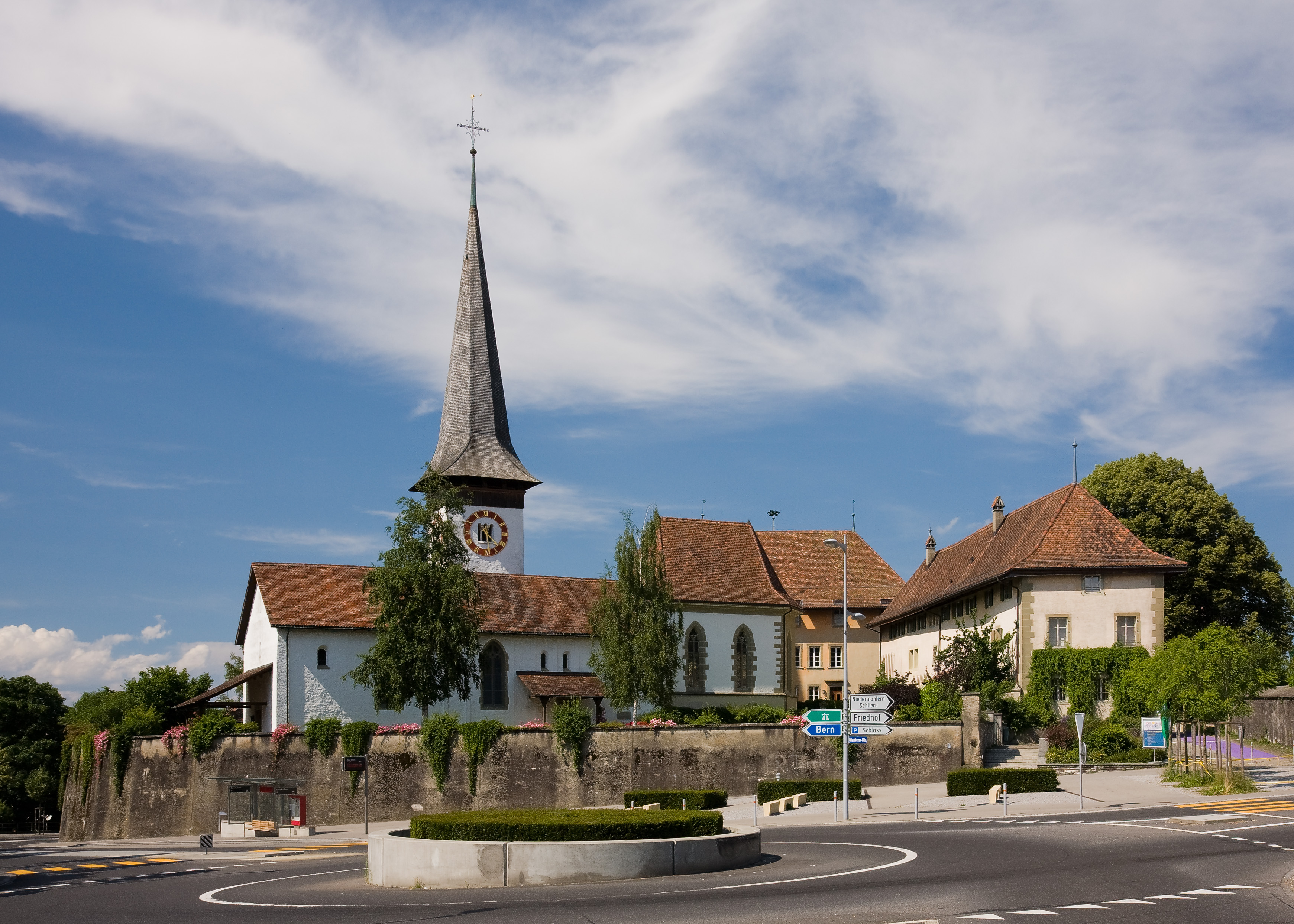 Das «Schloss» von Köniz, links im Bild die protestantische Kirche